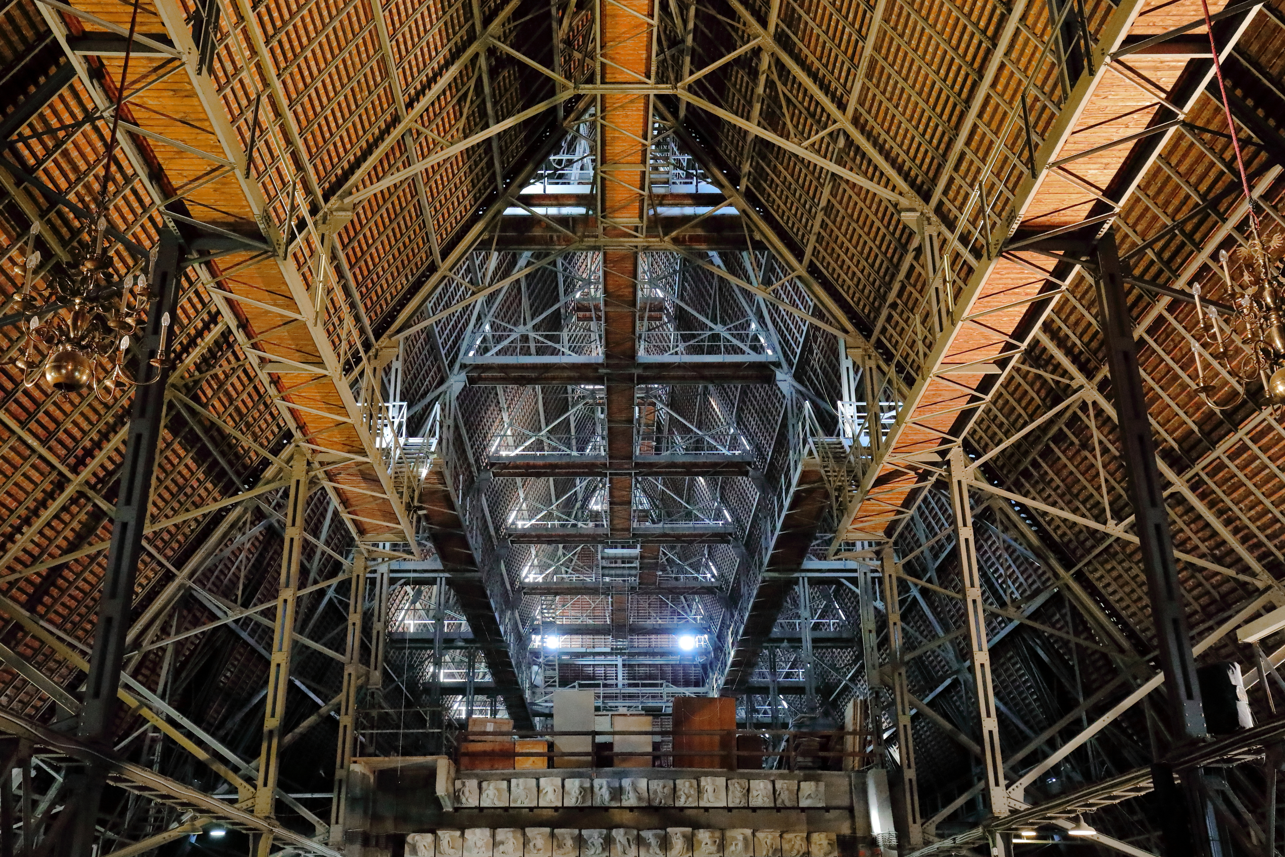 Der Dachstuhl des Stephansdoms in der österreichischen Bundeshauptstadt Wien. Am unteren Bildrand der erhöhte Bereich des Langhaus-Mittelschiffes.Der Dachstuhl ist eine rund 600 Tonnen schwere Stahlkonstruktion, die den Lärchenholz-Dachstuhl aus dem 15. Jahrhundert ersetzte, der 1945 zur Gänze abbrannte. Bei der Wiederinstandsetzung wurde zusätzlich vorab über den Gewölben eine Betondecke eingezogen (1946 über dem Langhaus mit dem leicht erhöhten Mittelschiff und 1948 über dem Chor), um einerseits bis zur Fertigstellung des Daches das Innere des Domes zu schützen und anderseits eine Arbeits- und Lagerfläche für den Wiederaufbau des Daches zu haben. Dieser Wiederaufbau, der weitgehendst in der gleichen Form des ursprünglichen Daches erfolgte, wurde mit November 1950 abgeschlossen.